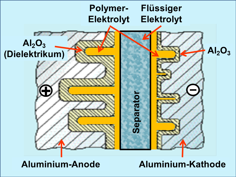 Konstruktionsprinzip der kapazitiven Zelle eines Hybrid-Polymer-Al-Elektrolytkondensators